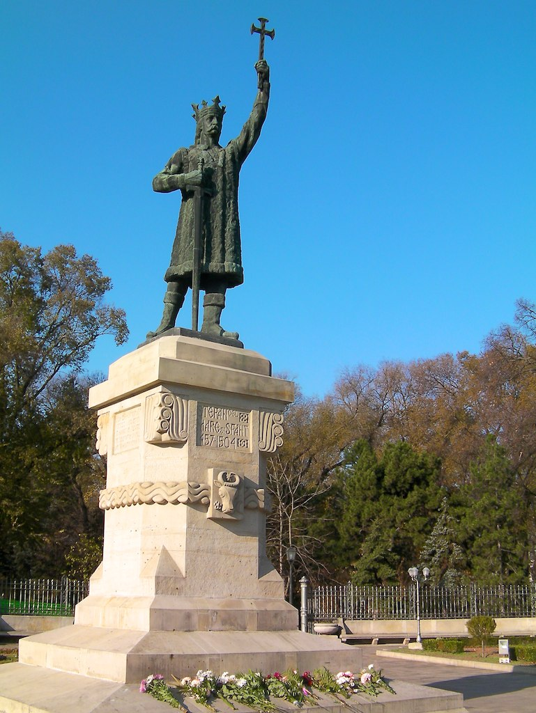 Stephen the Great Monument, Chișinău, Moldova